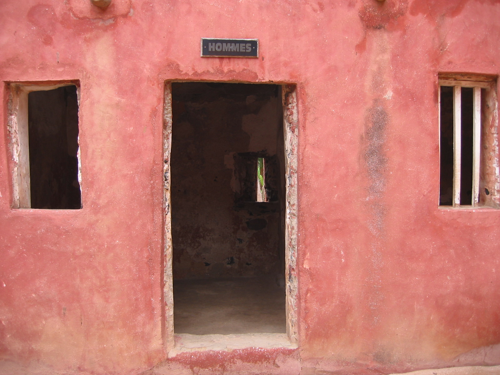 Cellule destinée aux hommes à la Maison des Esclaves (Gorée, Sénégal)